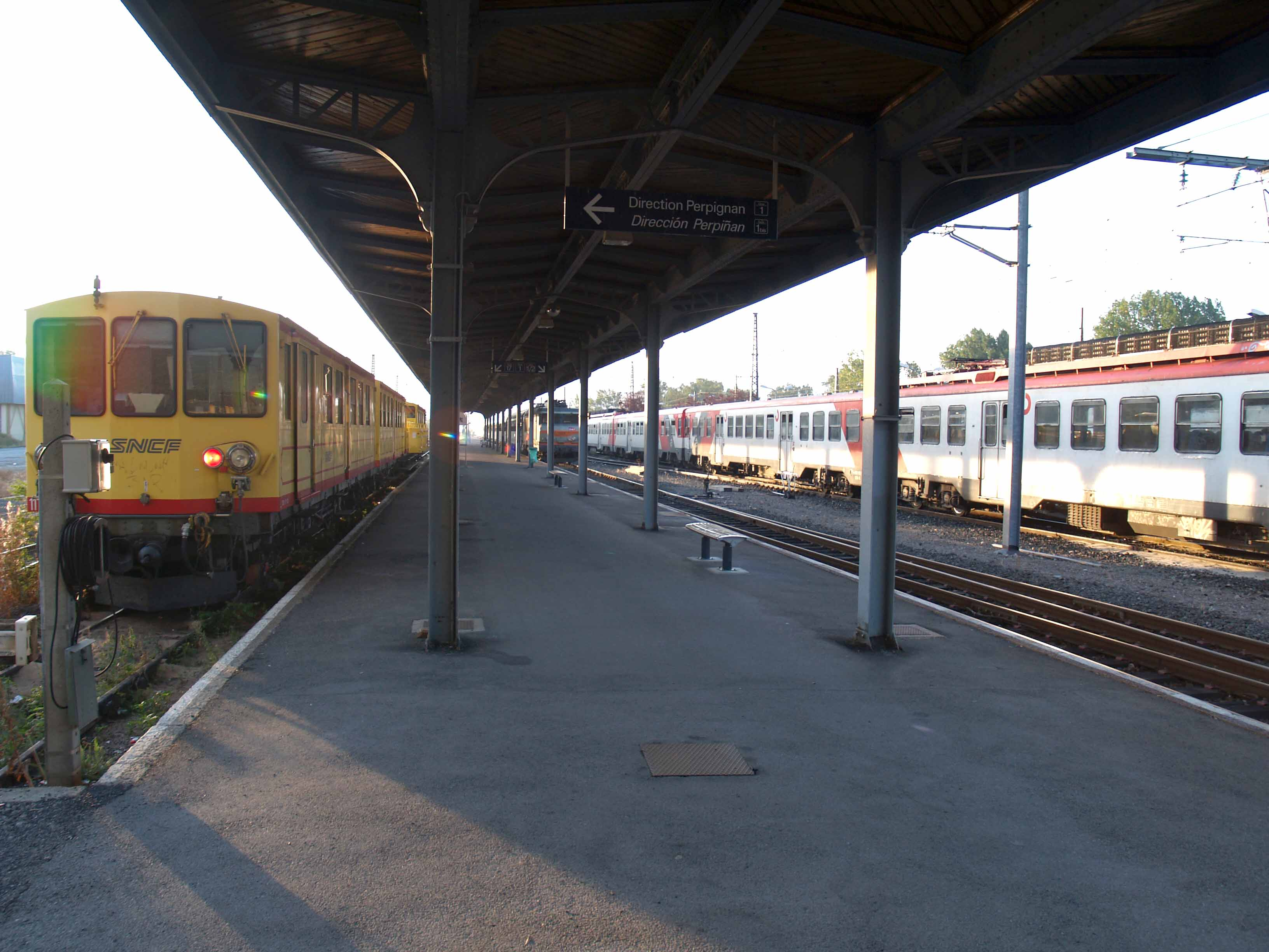 La gare internationale de La Tour de Carol Enveigt aux 3 écartements: métrique, européen, espagnol (1.00, 1.44 et 1.71)